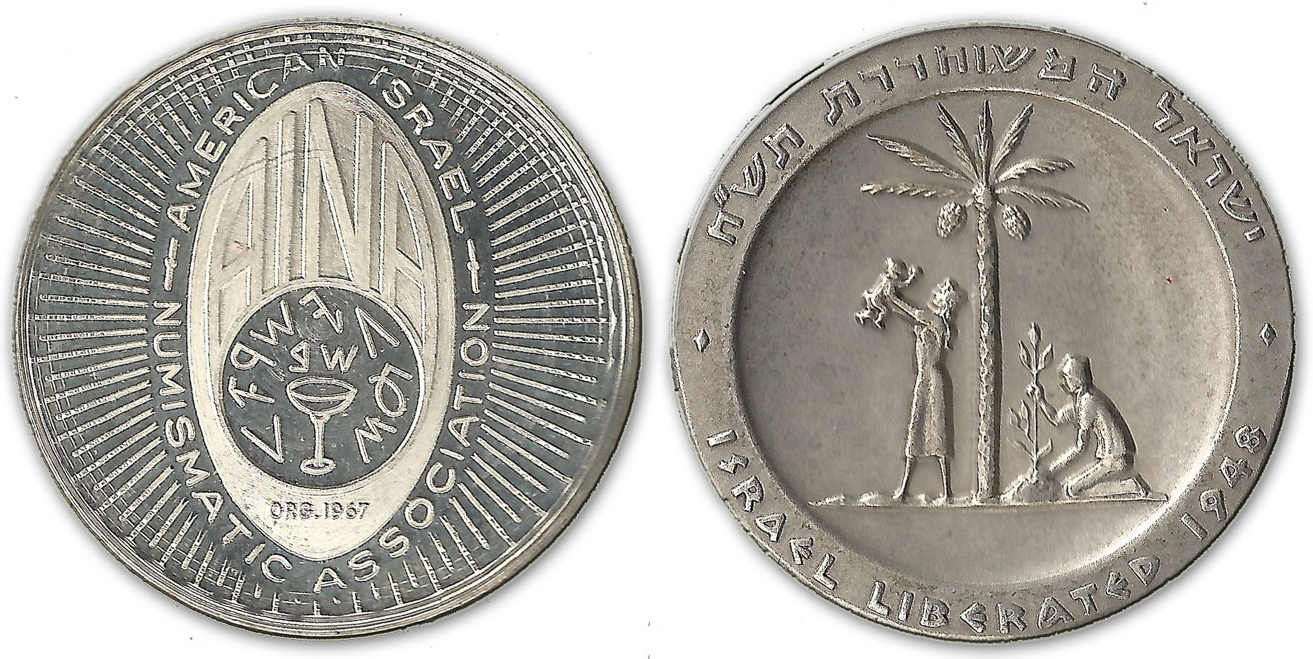 1981 האגודה האמריקאית ישראלית לנומיסמטיקה (AINA) - סיור בישראל